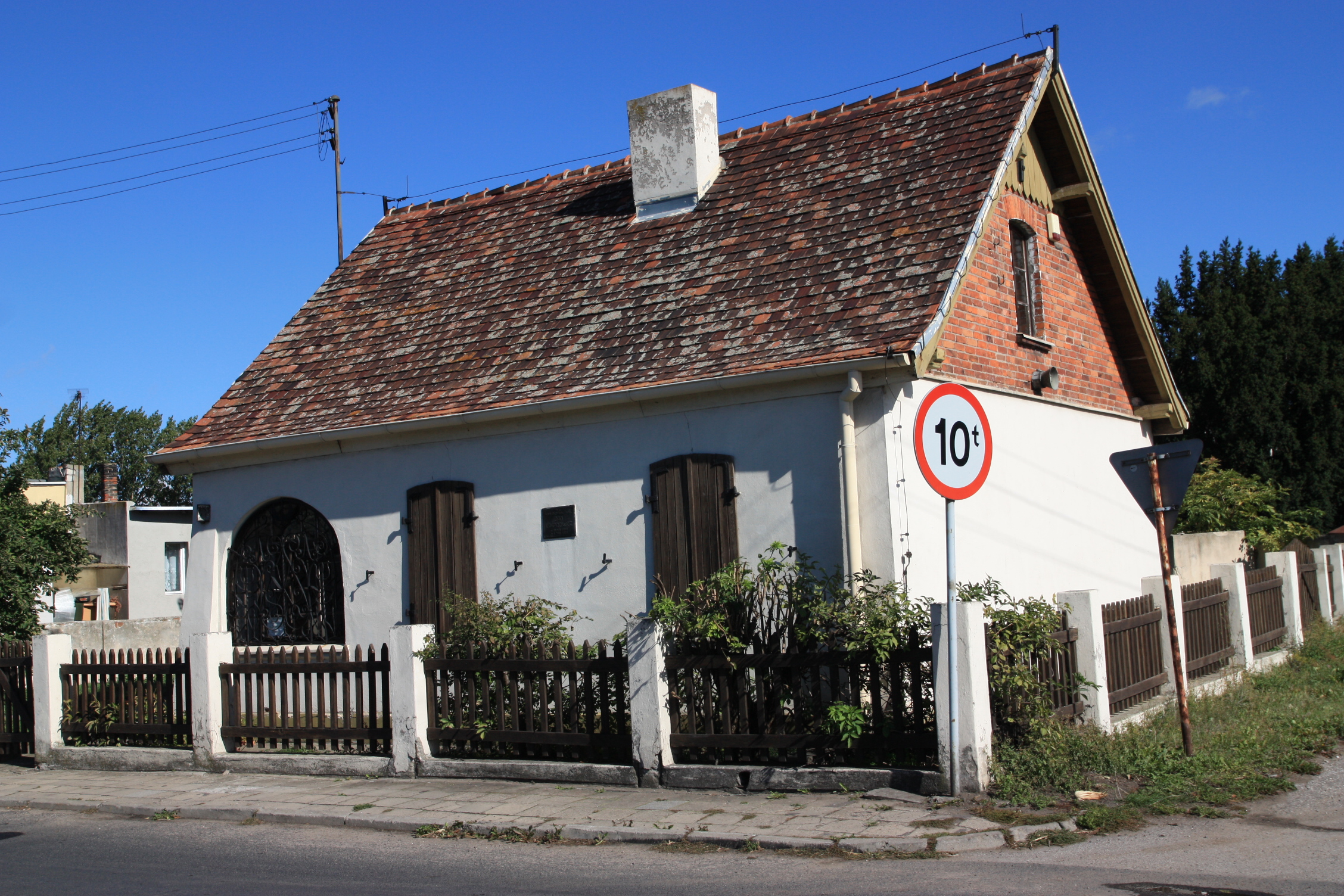 Inowrocław Szymborze, ul. Wielkopolska 11 - dom rodzinny Jana Kasprowicza (zabytek nr A/313/1)